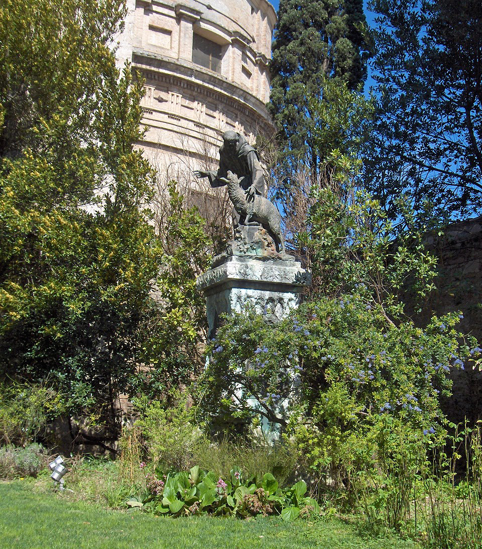 Rose garden of the Basilica Santa Maria degli Angeli, Assisi, Italy